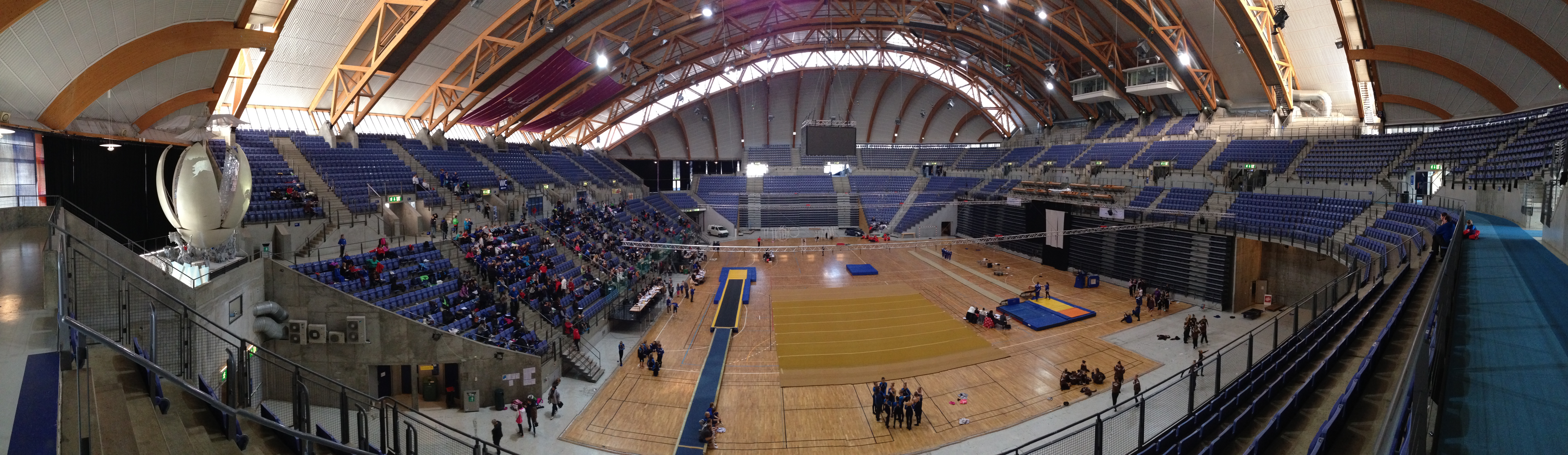 Håkons hall, ved Opplandspokalen 2013, en årlig konkurranse i troppsturn.